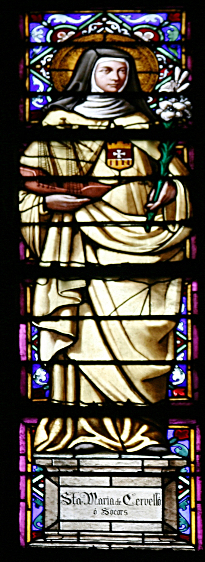 Interior da Basílica de Santa Maria del Mar